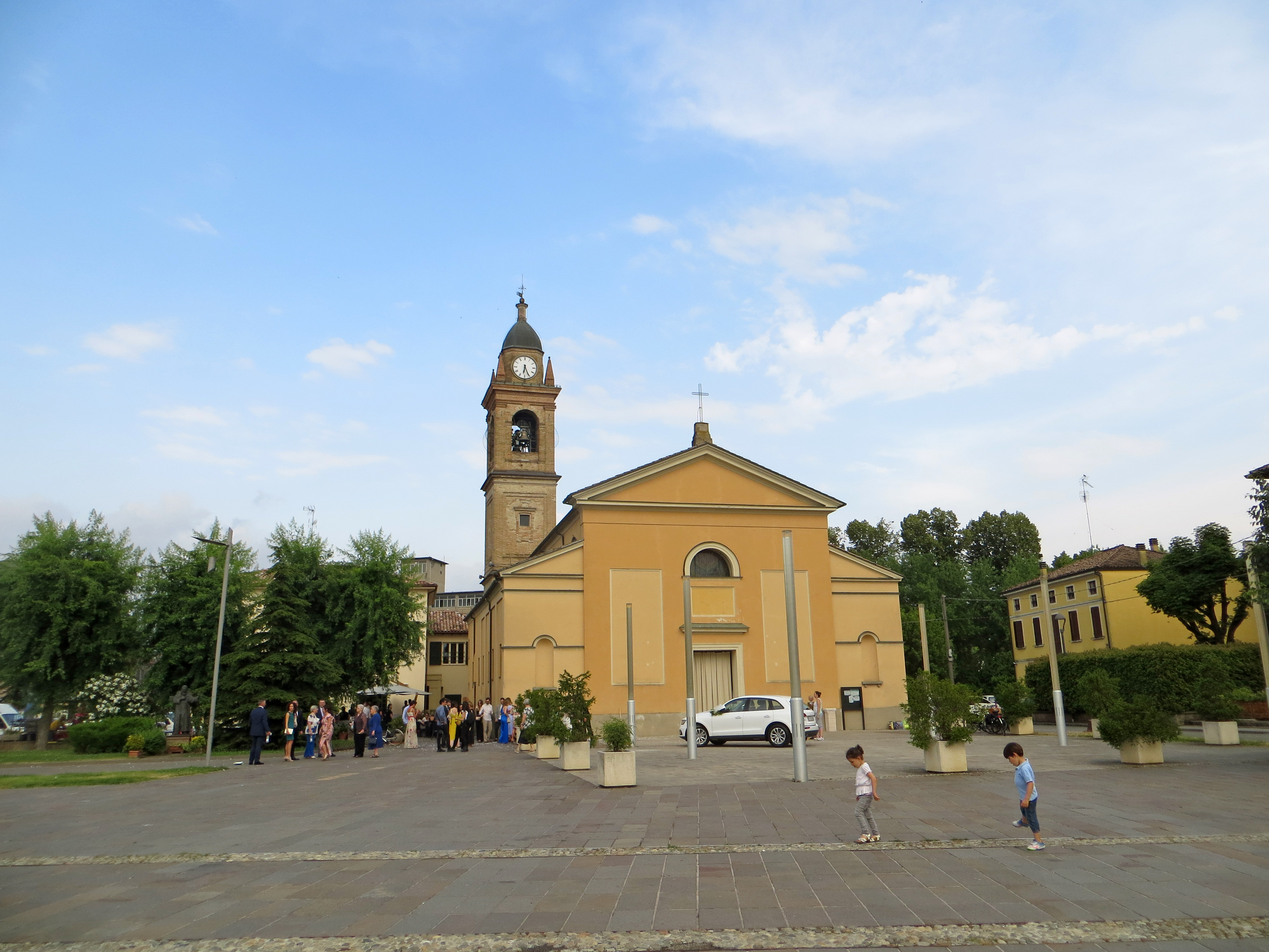 Chiesa dei Santi Faustino e Giovita (Sorbolo) - facciata